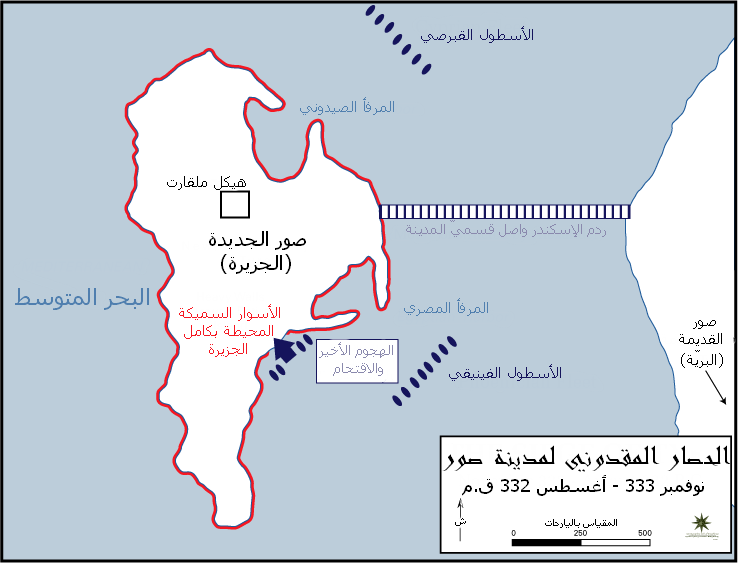 الحصار المقدوني لمدينة صور الفينيقية، بقيادة الإسكندر الأكبر.